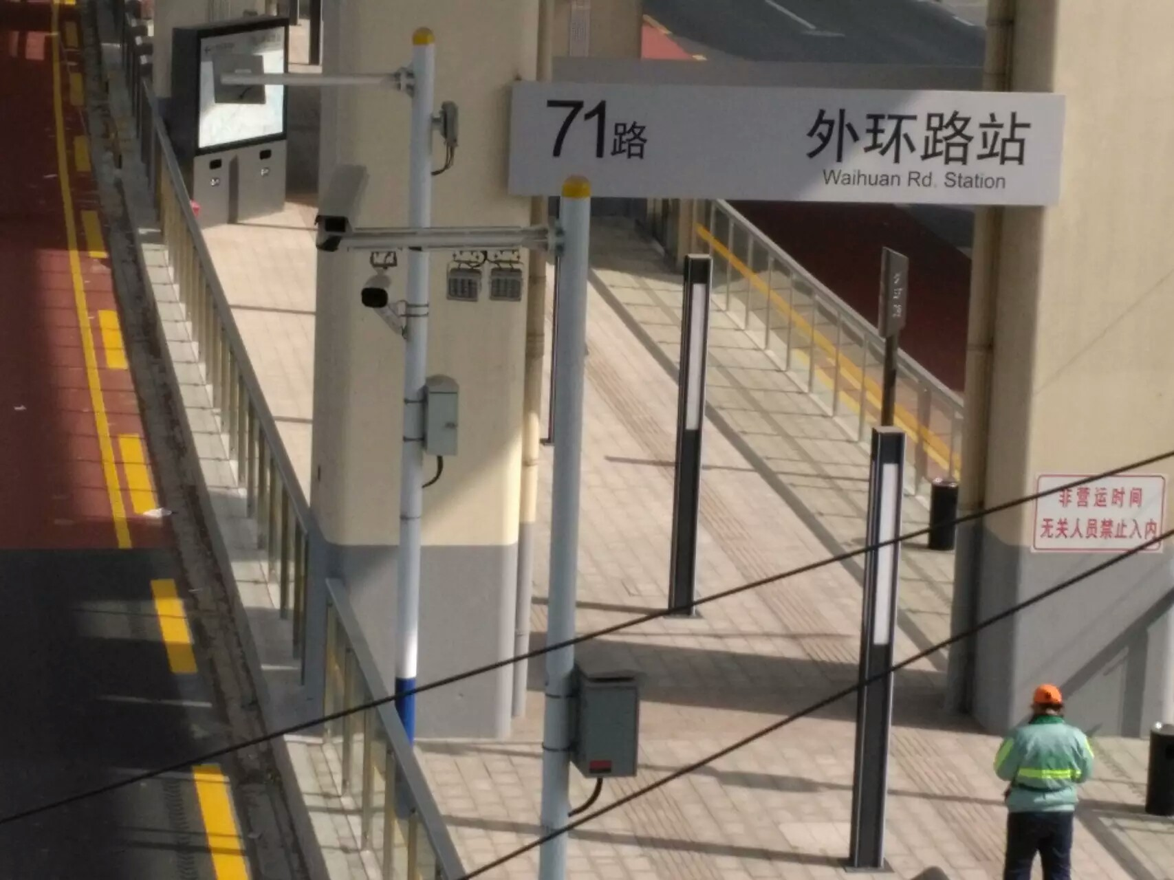 延安路中运量公交系统外环路站，位于延安西路沪青平公路口。